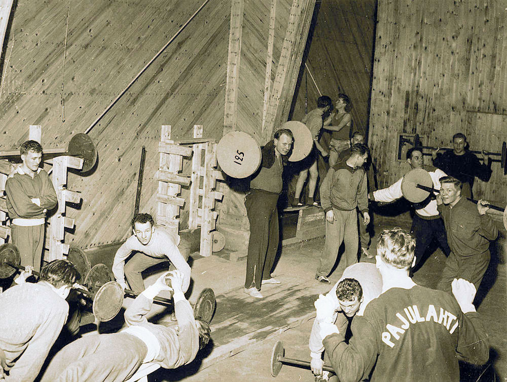 Nikulahallin voimailualue